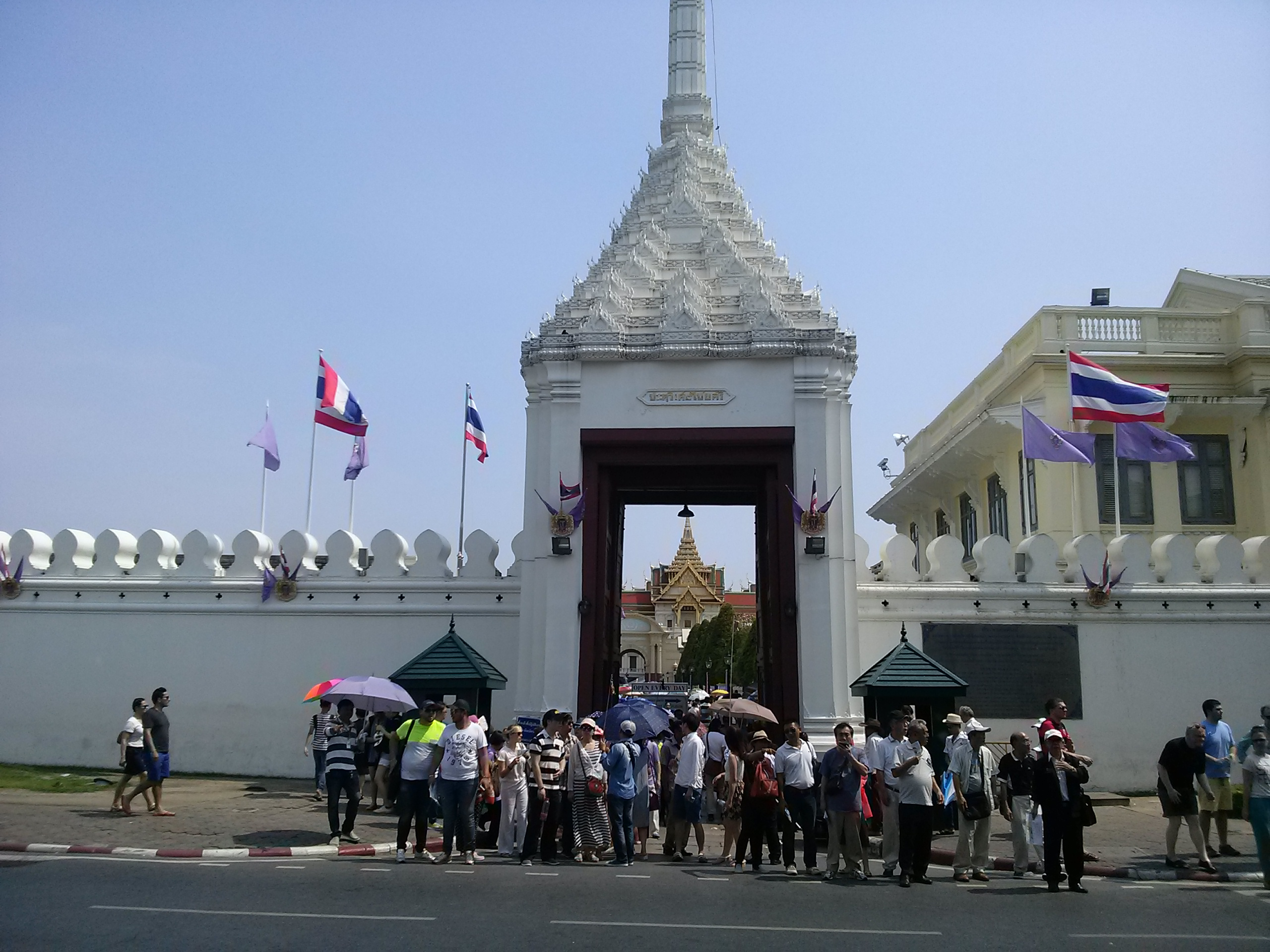 Phra Borom Maha Ratchawang, Phra Nakhon, Bangkok, Thailand